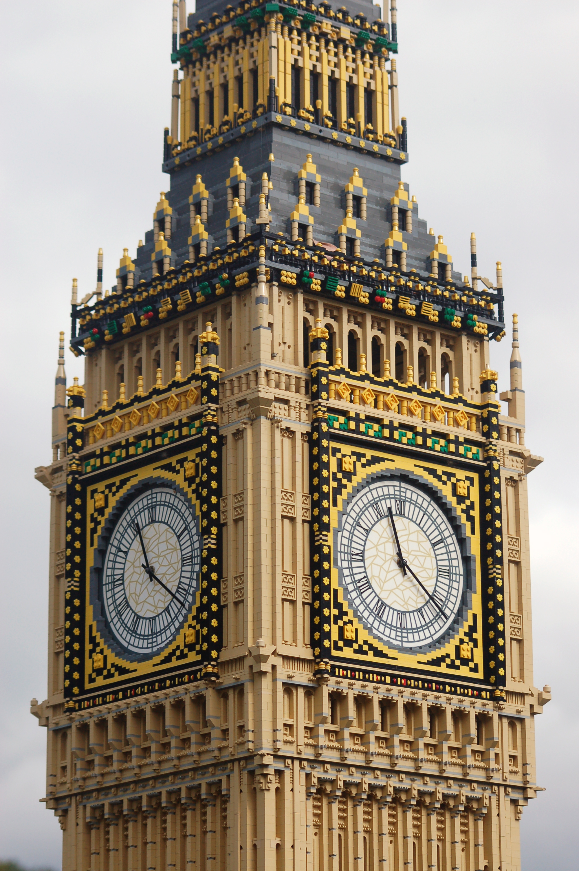 Legoland Windsor - Big Ben